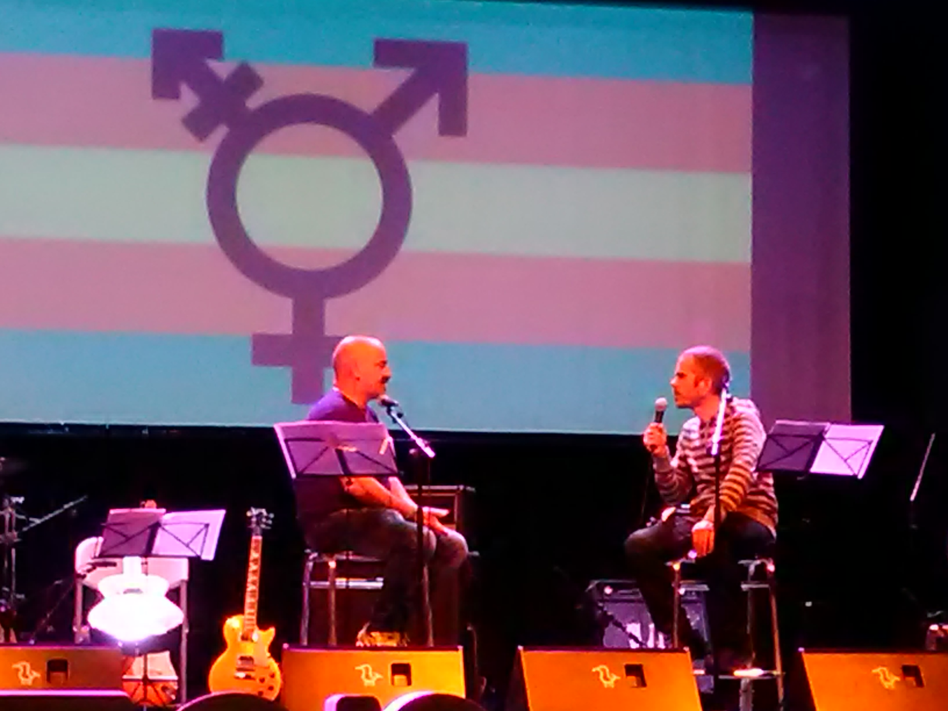 Ondarroa, 2019ko otsailaren 16a. "Naizen" elkartearen omenaldia Ekai Lersundiri, bere heriotzaren 1. urteurrenean.